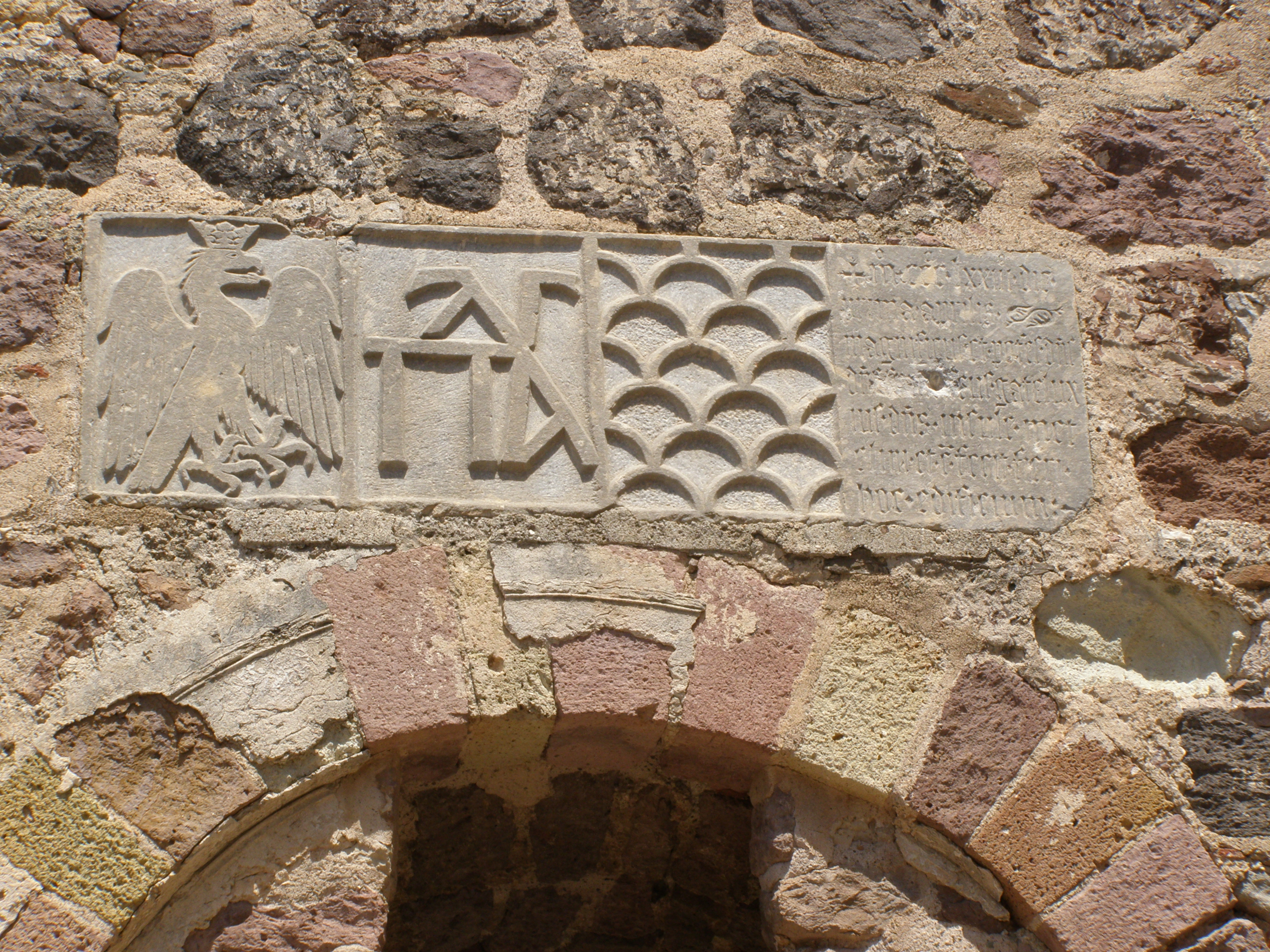 Castle of Mytilene